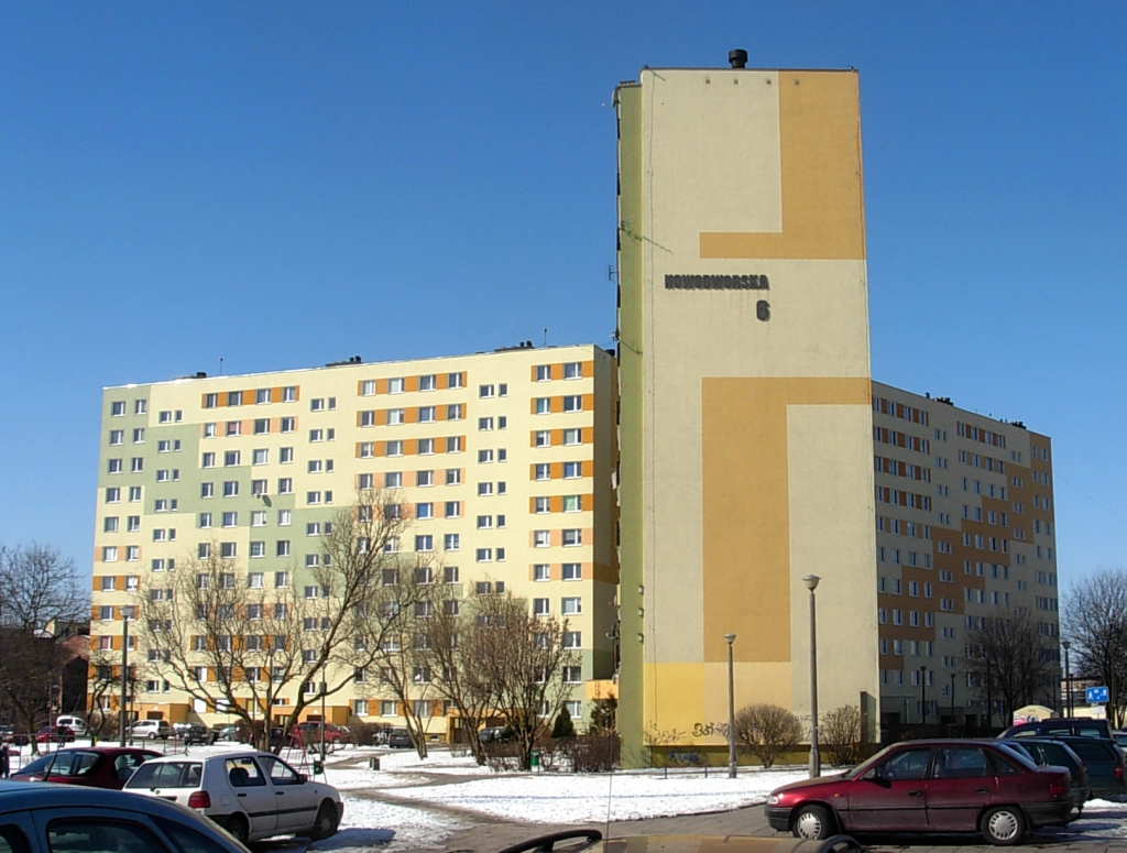 Zabudowa na osiedlu Szwederowo w Bydgoszczy